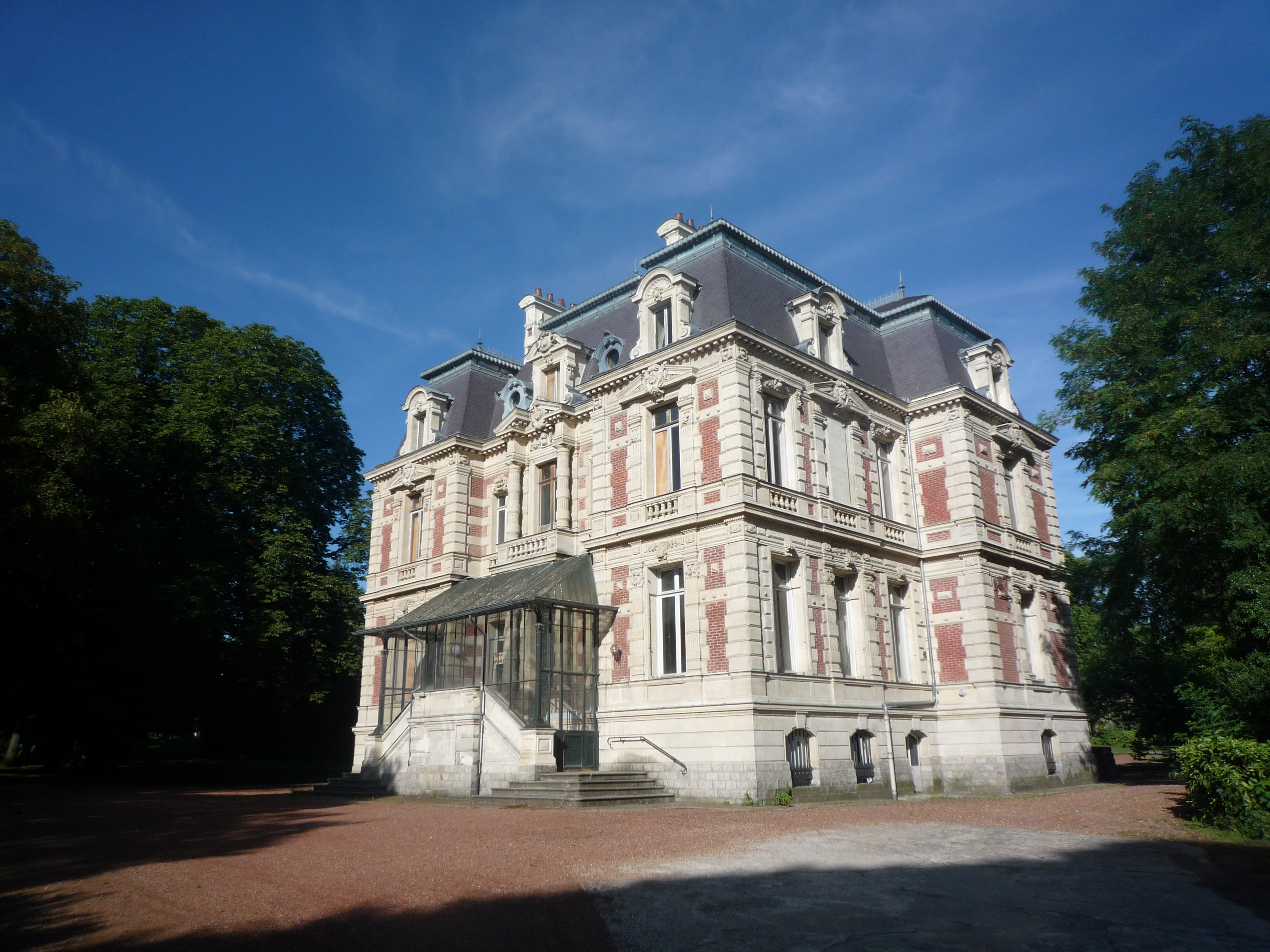 Château Dampierre, Anzin, Nord, Nord-Pas-de-Calais, France.